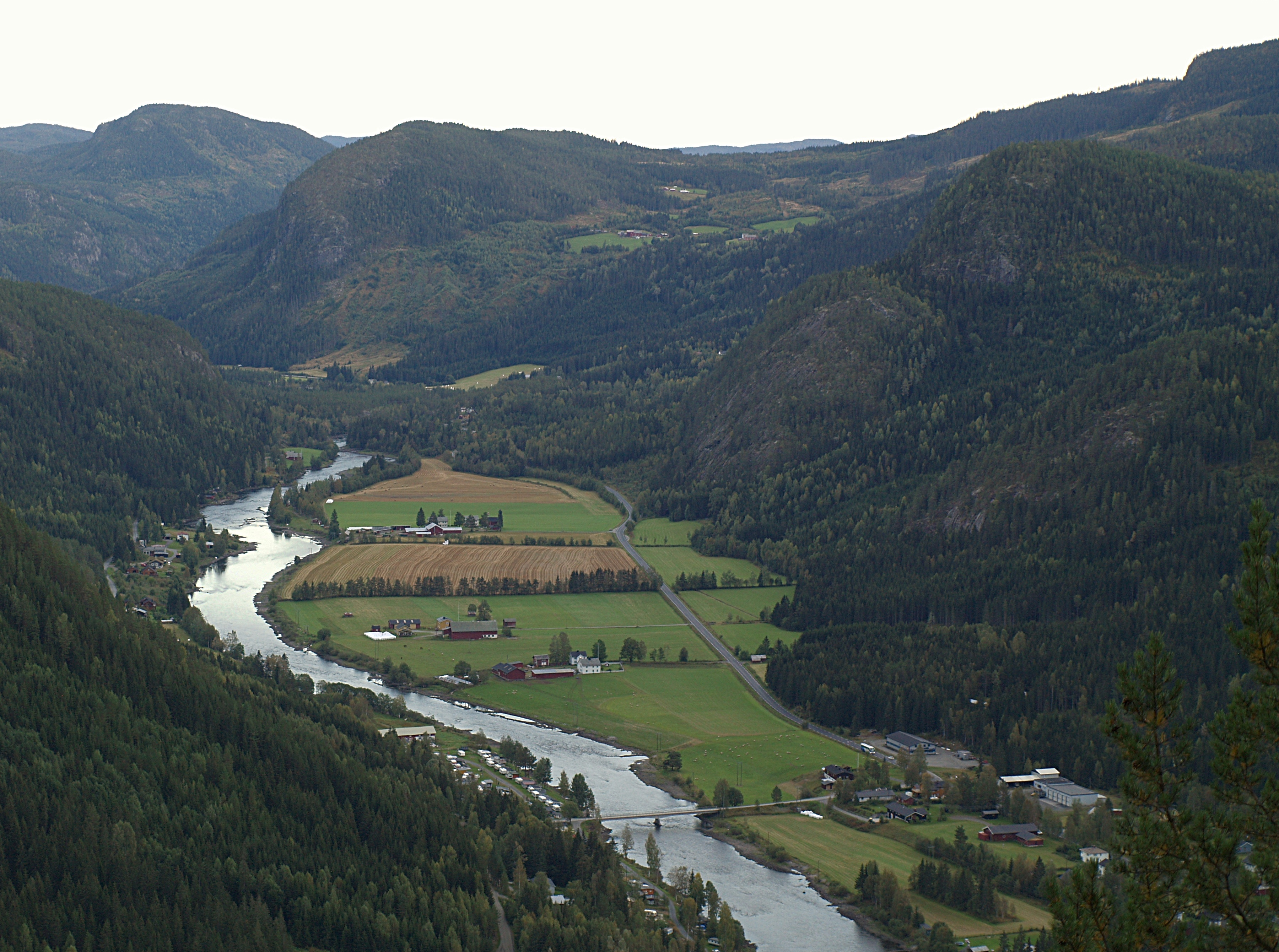 Smedlund in Sør-Aurdal. Photo from Bjørneskardet